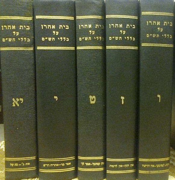 חלק מכרכי האנציקלופדיה התורנית-תלמודית "בית אהרן"